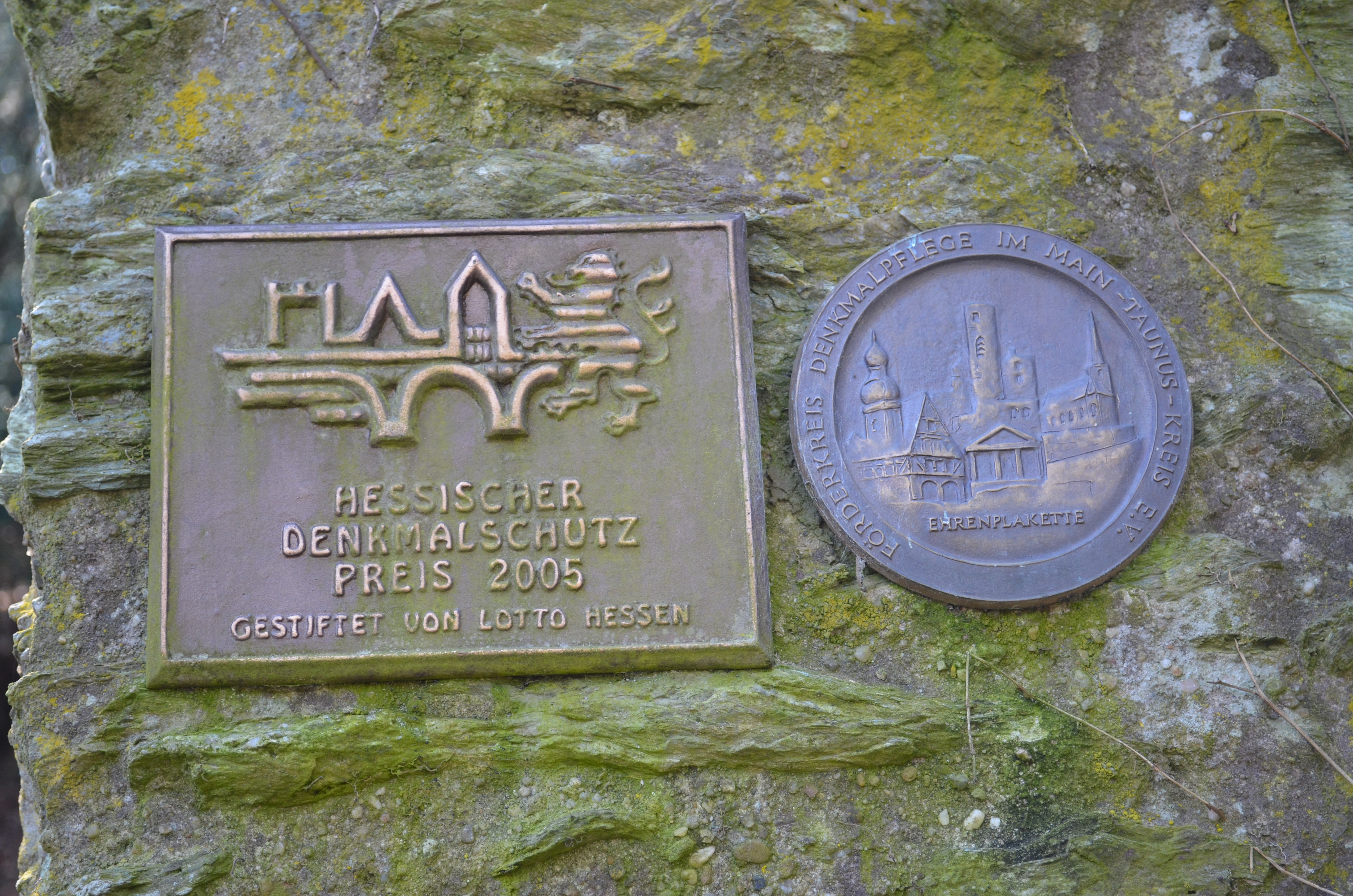 Eppstein, Rödelbergweg 1, Tafeln